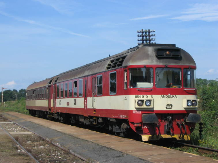 Motorový vůz řady 854, stanice Smidary